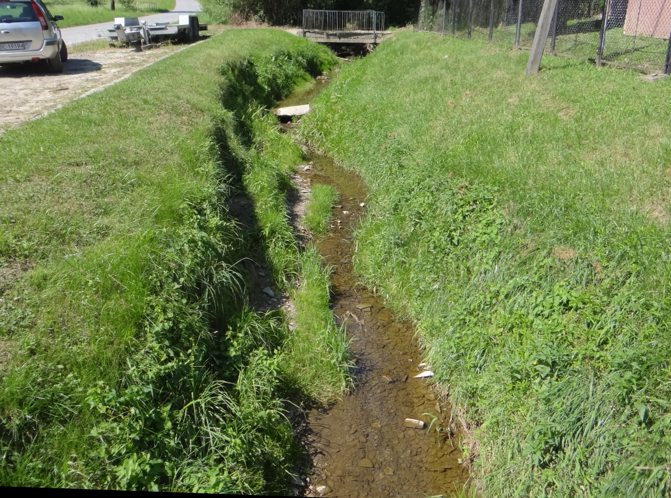 Gruszów (powiat myślenicki). Potok Gruszów